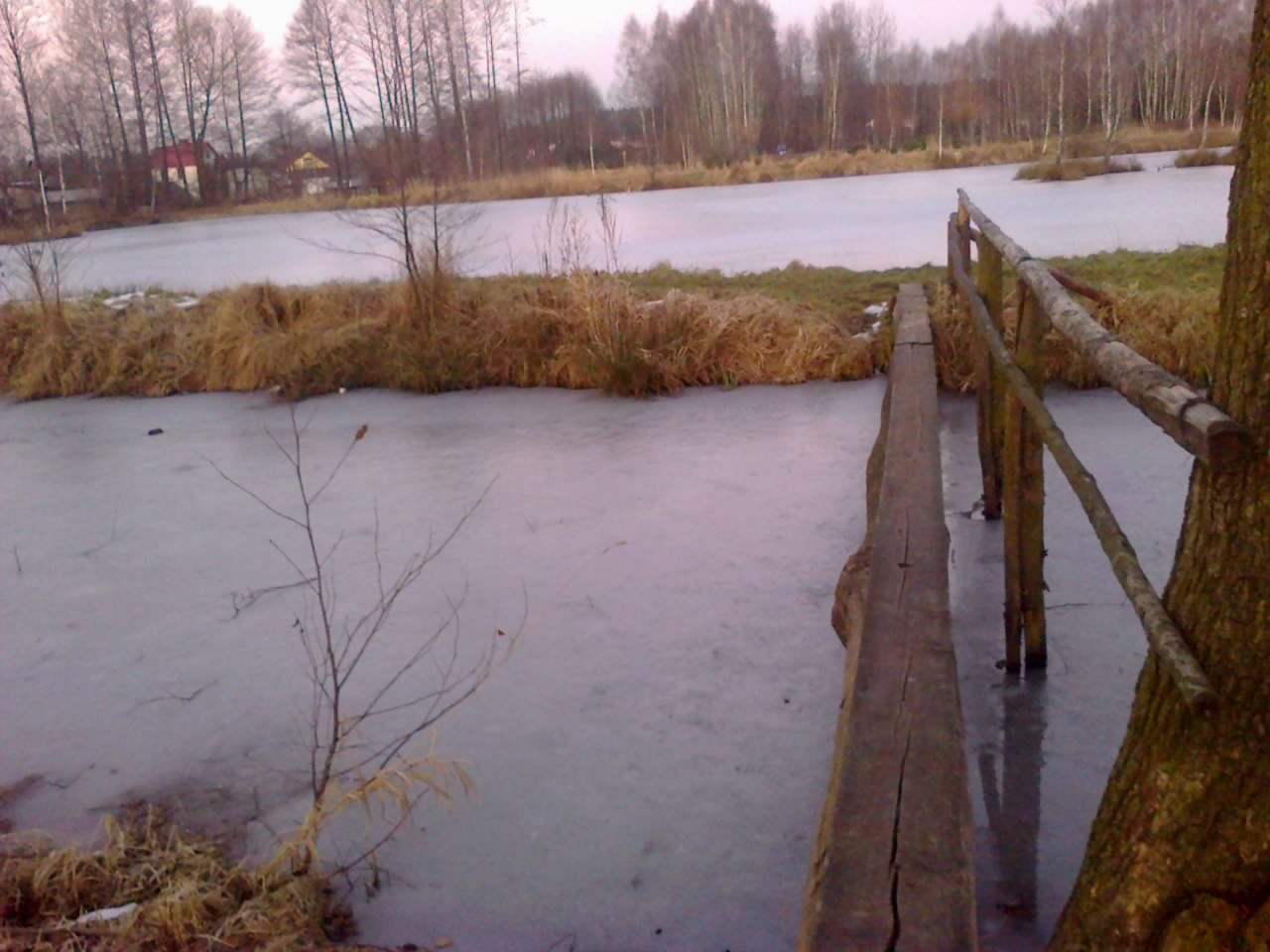 Kładka jest po to, aby przejść na groblę widoczną na fotografii.